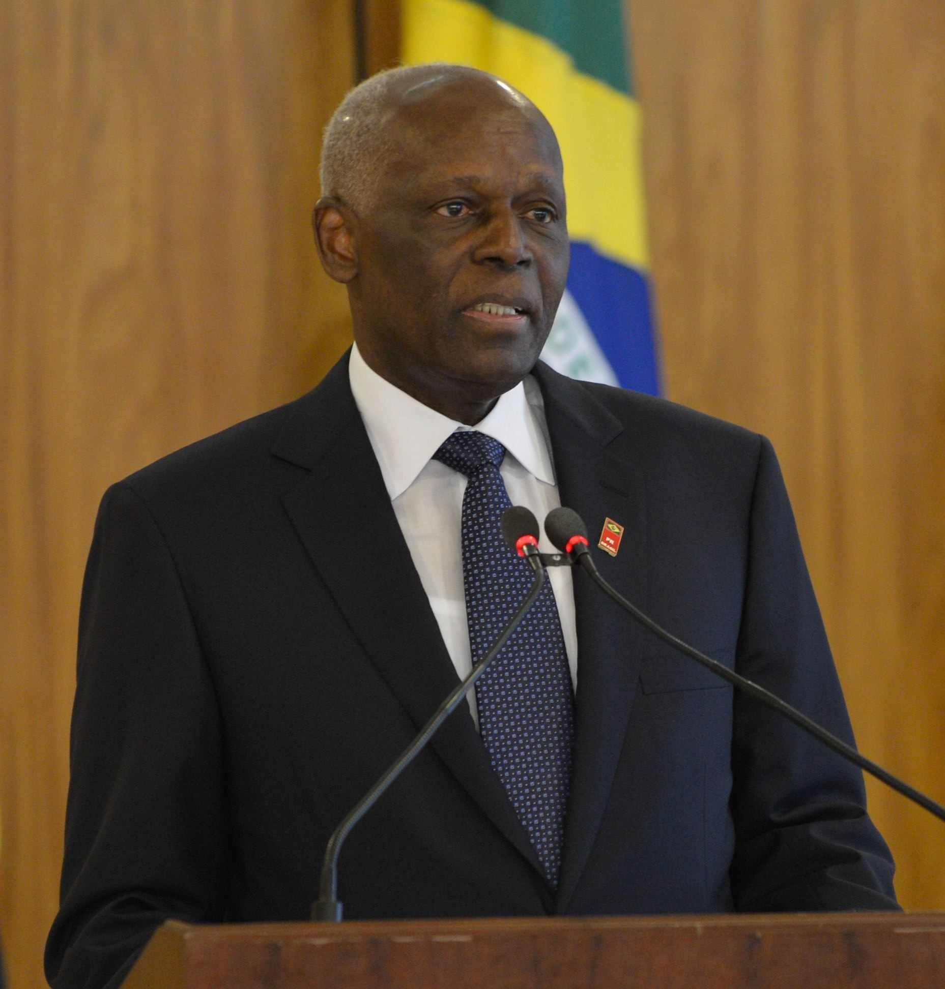 Dilma recebe o presidente de Angola, José Eduardo dos Santos